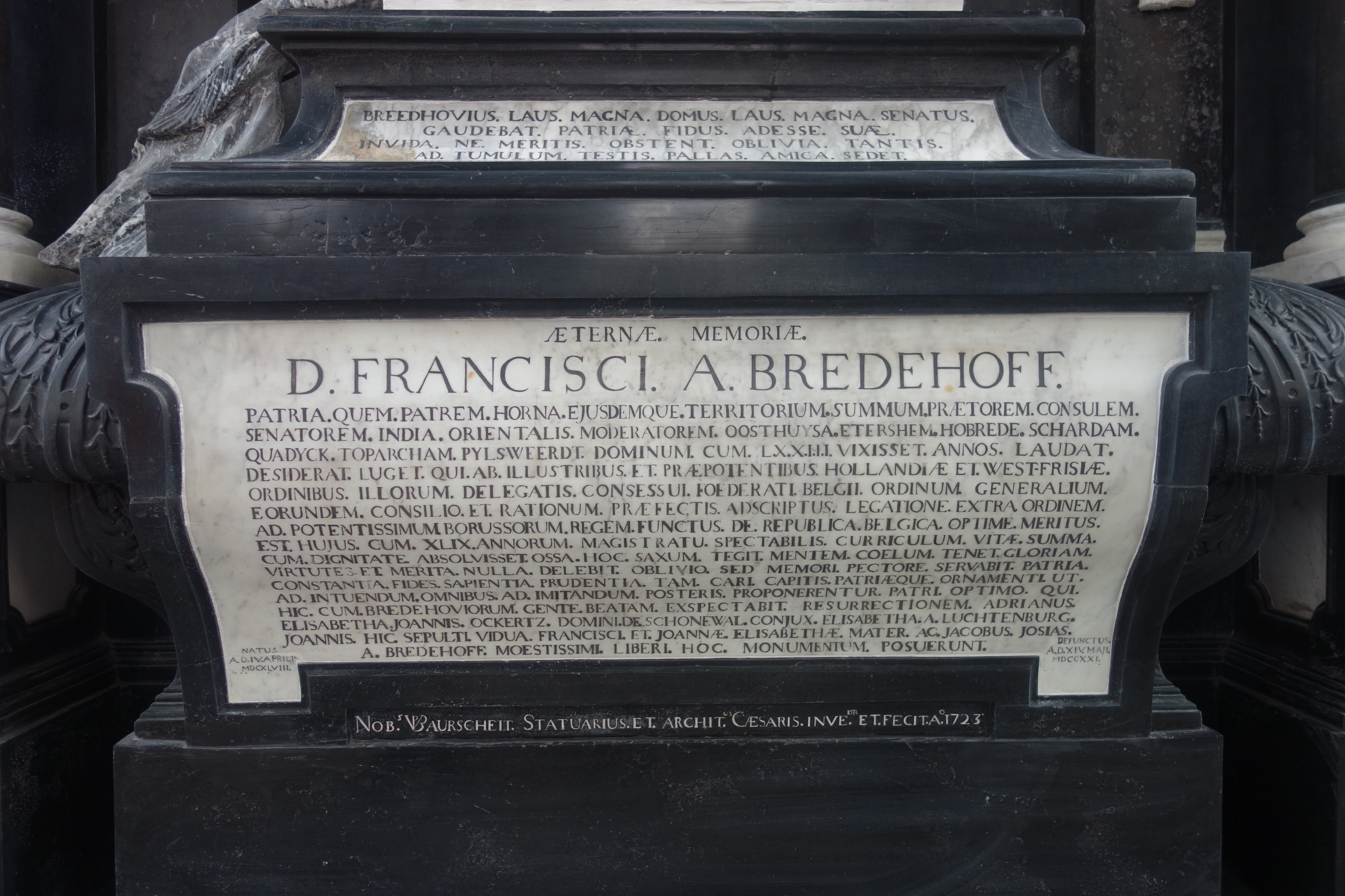 Onder Minerva en het medaillon is op de zijkant van de "kist" in het Latijn een grafschrift geplaatst. Hierin staan onder andere loftuitingen aan Van Bredehoff, uitingen van rouw en van troost aan de nabestaanden en de stad Hoorn, waar Van Bredehoff in de politiek zat.